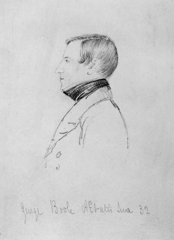 George Boole by unknown artist, 1847. Inscribed along the bottom, in pencil: George Boole Aetatis Suae 32 (Early Victorian Portraits Catalogue)